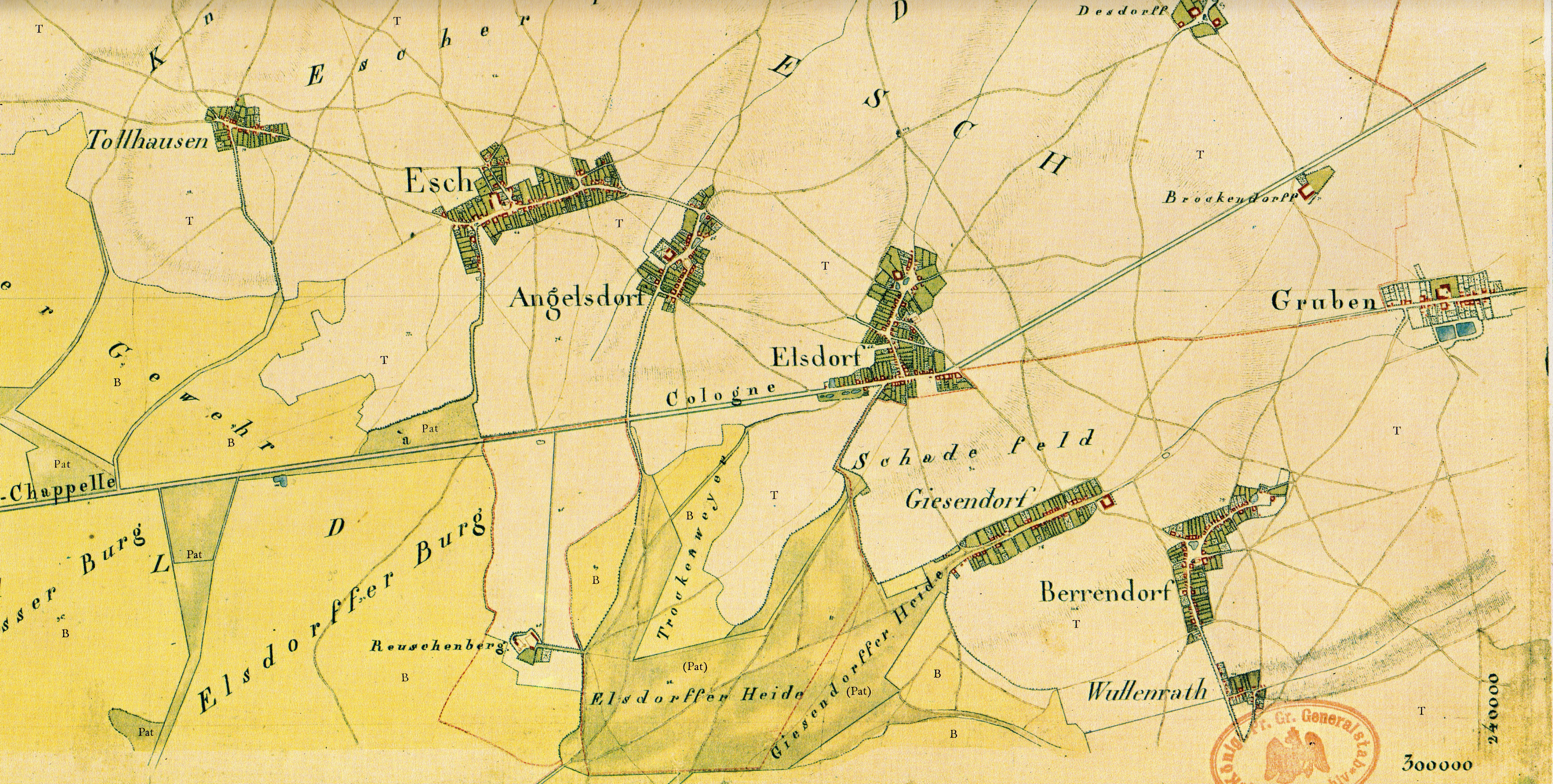 Kartenaufnahme der Rheinlande durch Tranchot und von Müffling